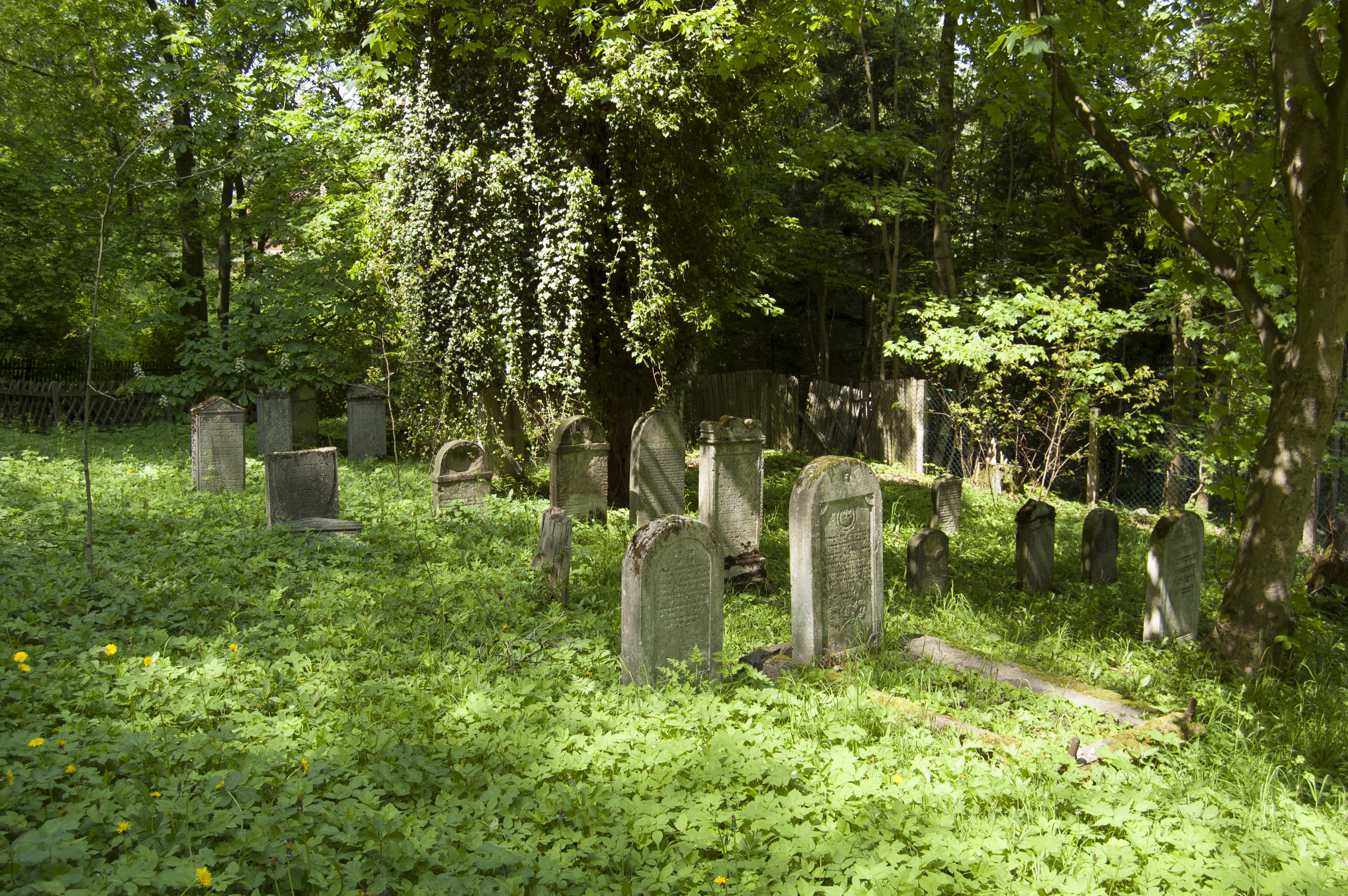 Ansicht vom Mai 2010